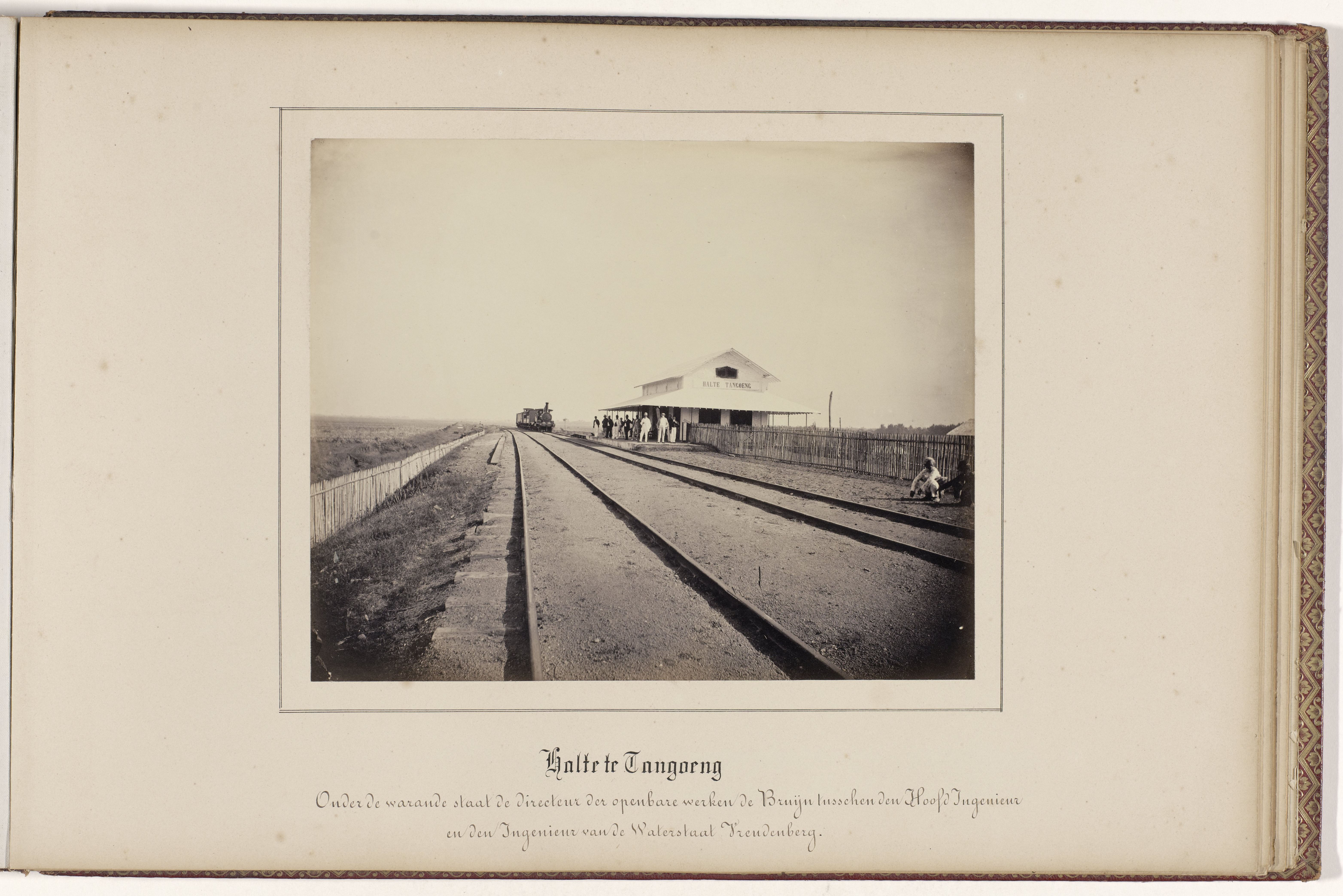 IdentificatieTitel(s): Halte te Tangoeng / Onder de warande staat de directeur der openbare werken de Bruijn tusschen den Hoofd Ingenieur en den Ingenieur van de Waterstaat Vrendenberg. (titel op object)Objecttype: foto albumblad Objectnummer: NG-1991-20-23Omschrijving: Opening van de Halte Tanggoeng bij Semarang, 10 augustus 1867. Op het perron staat de directeur van Burgerlijke Openbare Werken in Nederlandsch-Indië, H. de Bruijn, links van hem hoofdingenieur P.J.G. Beyerinck en rechts ingenieur H. Vrendenberg. Op het spoor staat een trein. Albumblad met opgeplakte foto, onderdeel van het fotoalbum over de aanleg van de spoorlijn Semarang - Kedoeng Djattie (Kedungjati) op Java in 1865.VervaardigingVervaardiger: fotograaf: Woodbury & PagePlaats vervaardiging: JavaDatering: 1867Fysieke kenmerken: albuminedrukMateriaal: fotopapier karton Techniek: albuminedrukAfmetingen: foto: h 195 mm × b 239 mmblad: h 305 mm × b 450 mmOnderwerpWanneer: 1860 - 1875Waar: Nederlands-IndiëWie: Hendrik de BruijnPieter Johannes Gerardus BeijerinckH. VrendenbergVerwerving en rechtenVerwerving: aankoop 21-nov-1991Copyright: Publiek domein